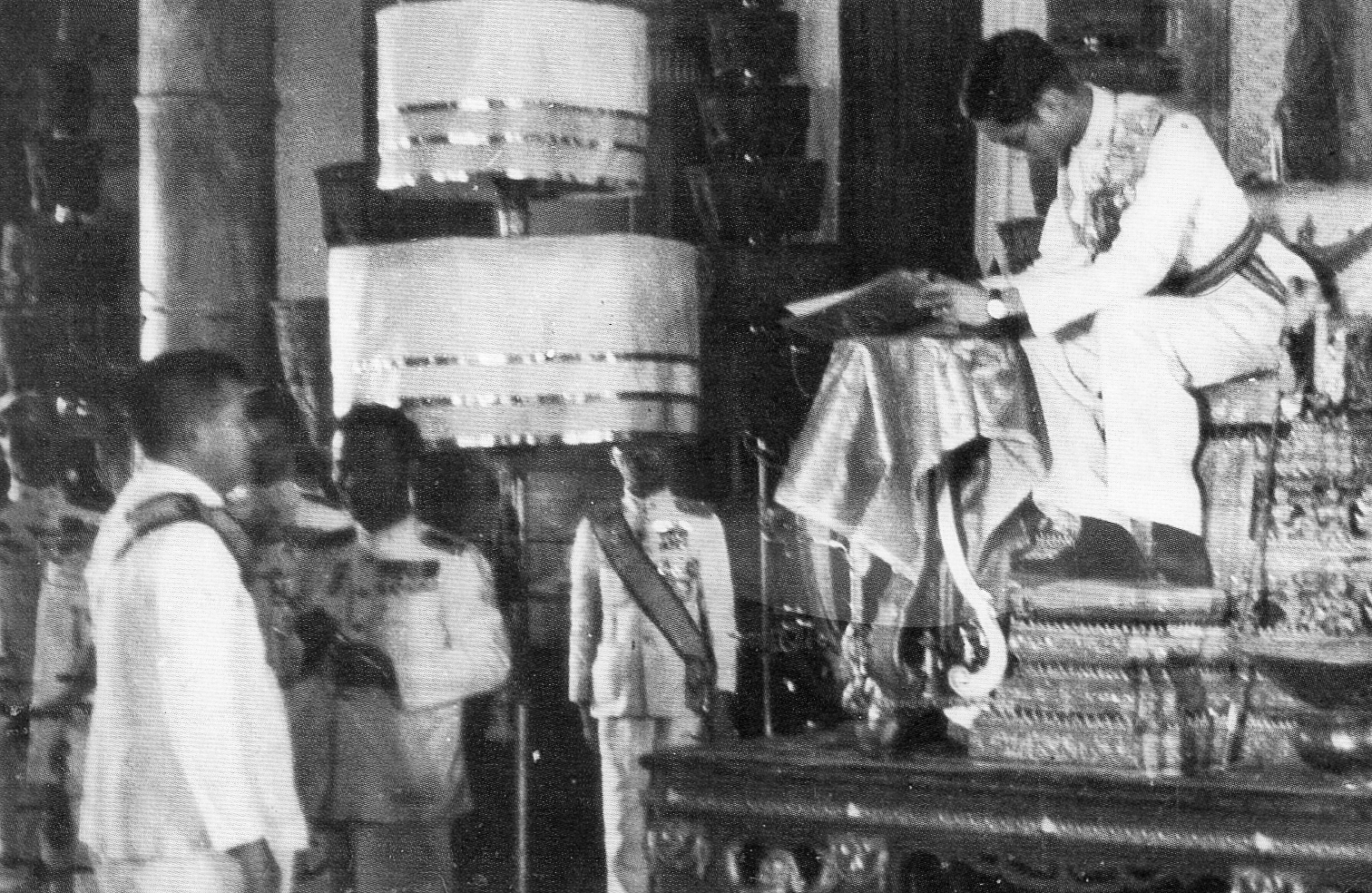 สมเด็จพระเจ้าอยู่หัวอานันทมหิดลทรงลงพระปรมาภิไธยในรัฐธรรมนูญแห่งราชอาณาจักรไทย พุทธศักราช 2489 เมื่อวันที่ 10 พฤษภาคม พ.ศ. 2489 โดยมีนายปรีดี พนมยงค์ เป็นผู้รับสนองพระบรมราชโองการ